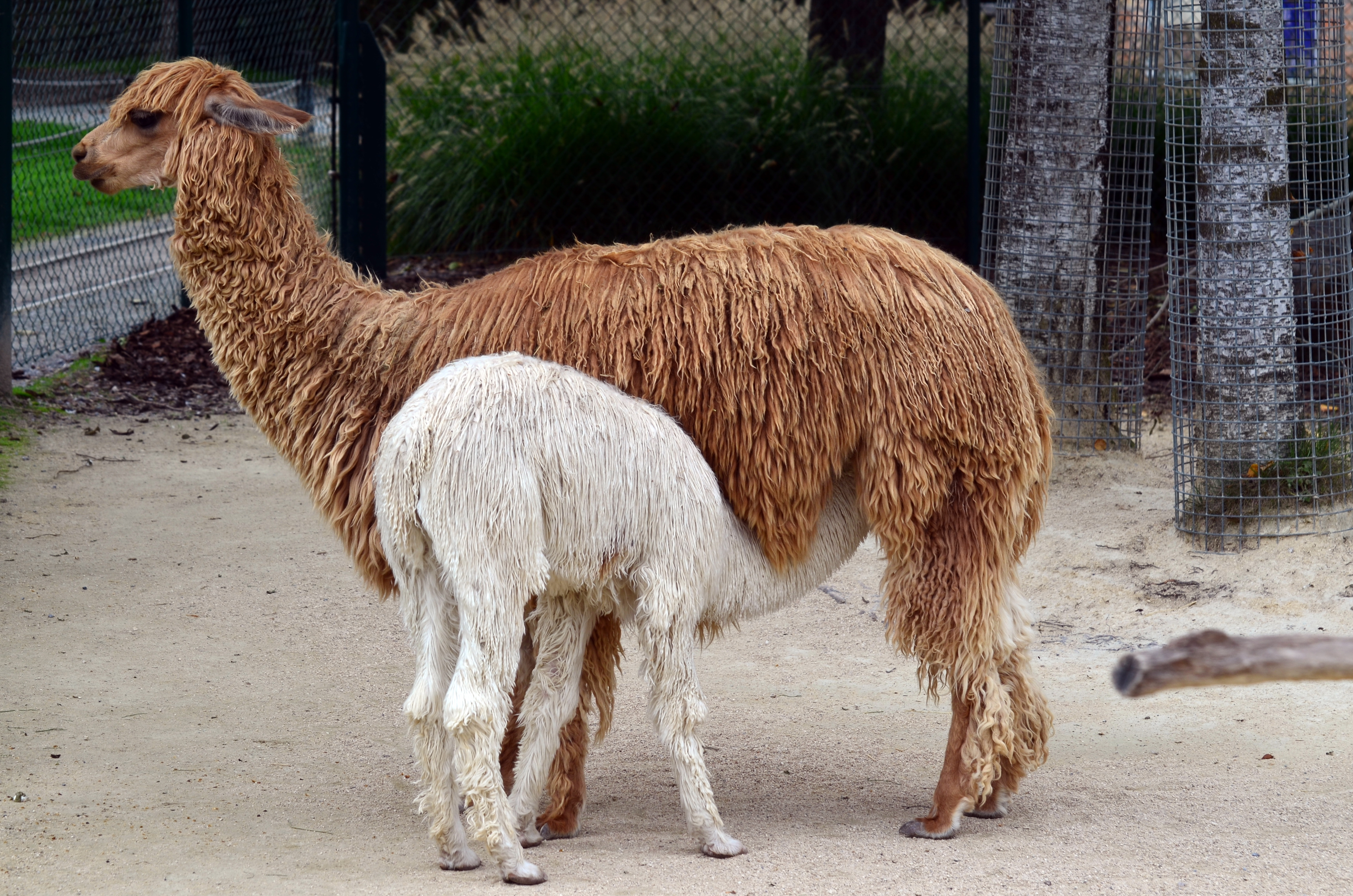 Vicugna pacos, Knie's Kinderzoo in Rapperswil (Switzerland)